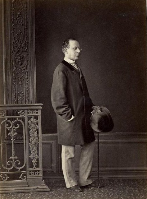 Помпей Николаевич Батюшков